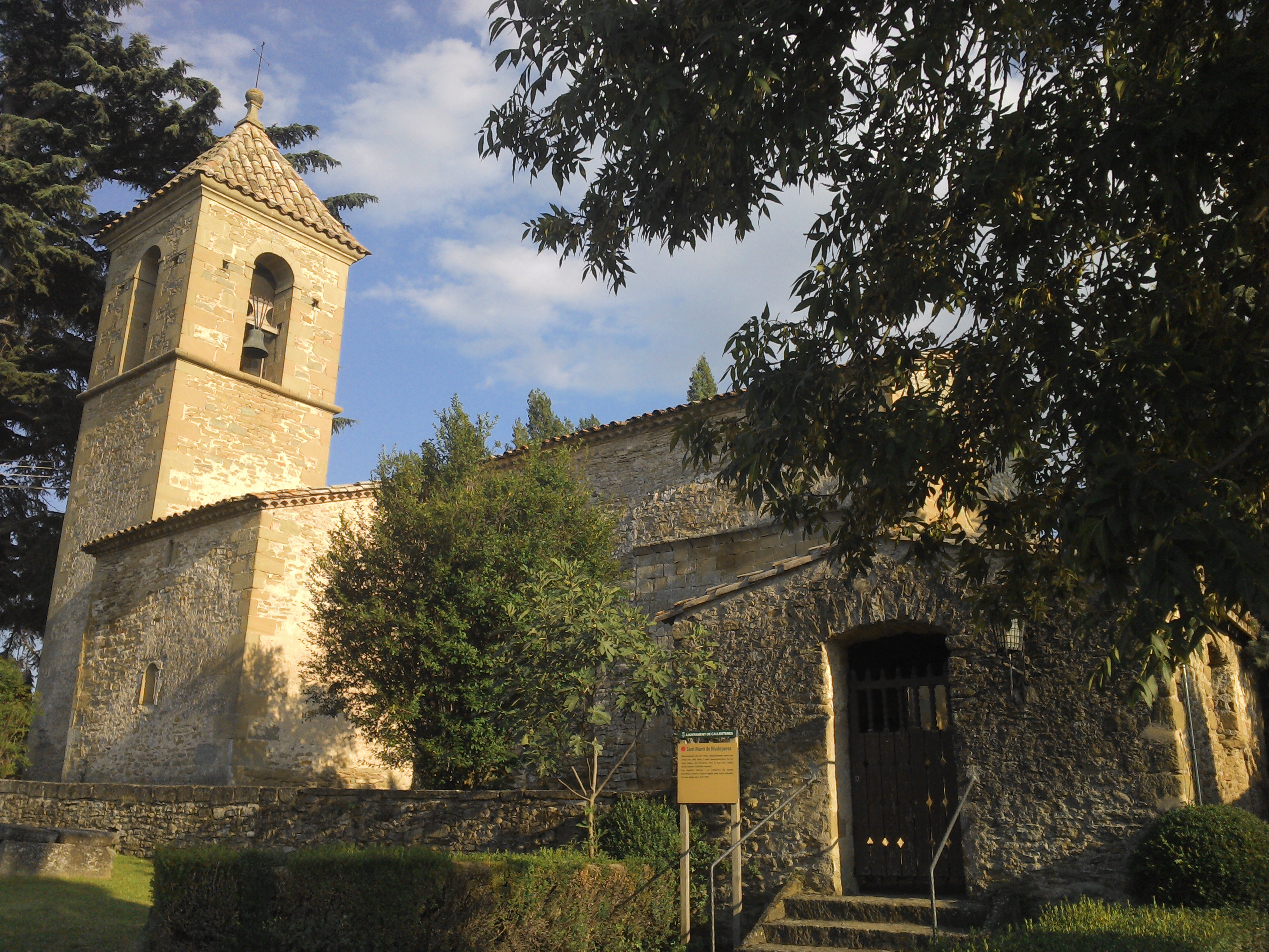 Església de Sant Martí de Riudeperes (Calldetenes, Osona, Catalunya, Països Catalans)